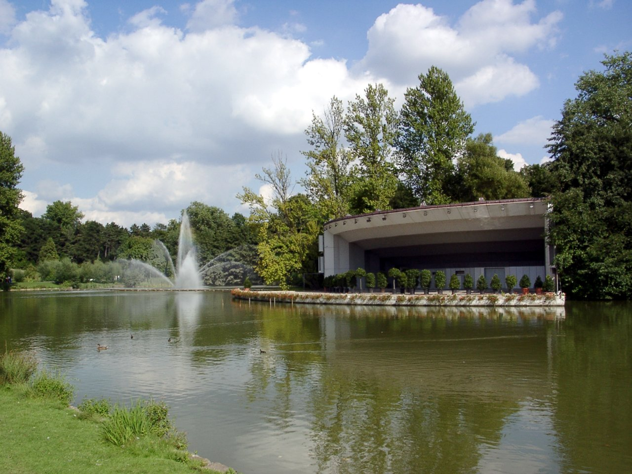 Seebühne im Dortmunder Westfalenpark